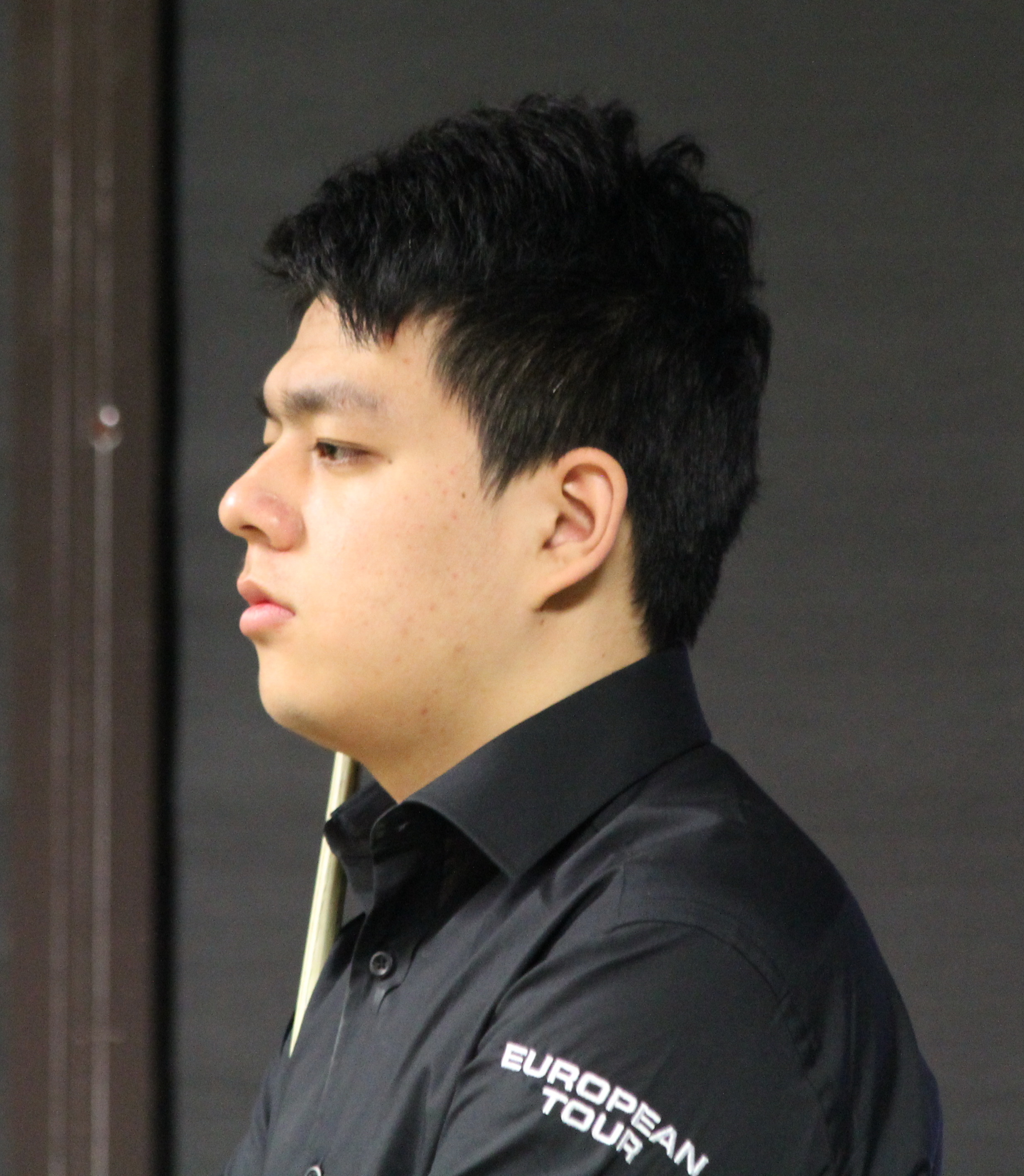 Lu Ning beim Paul Hunter Classic 2014